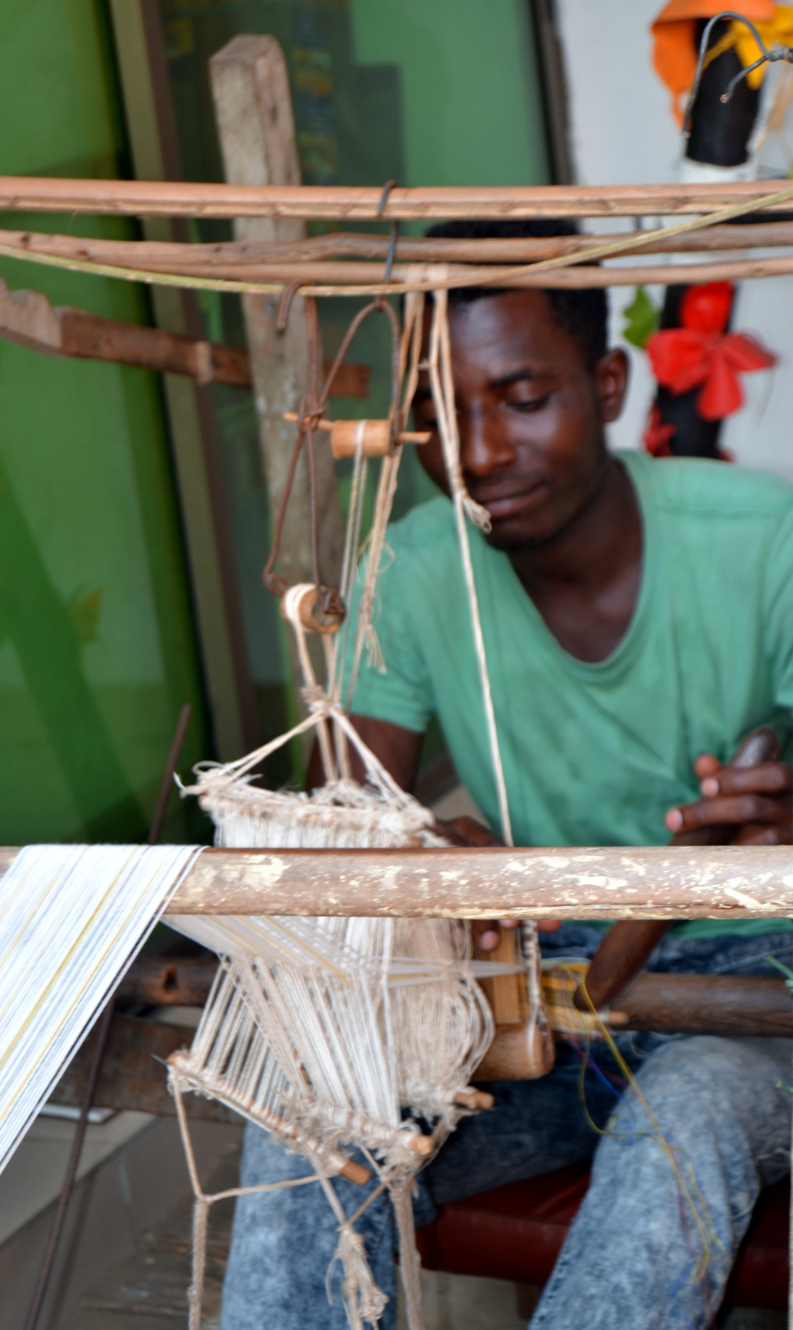 Tisserand sur son lieu de travail This is an image of "African people at work" from Ivory Coast